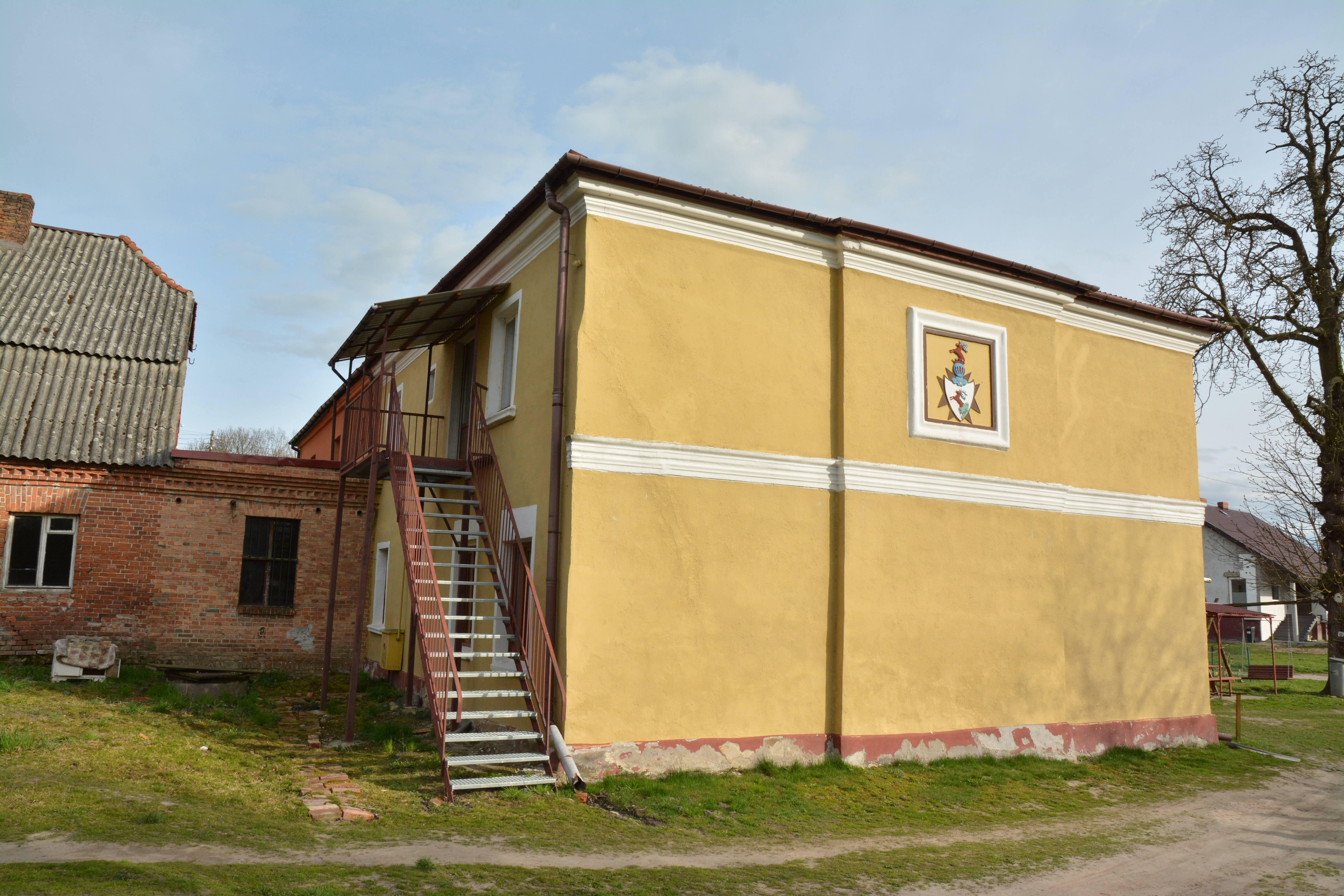 Mechowo (gmina Pyrzyce)